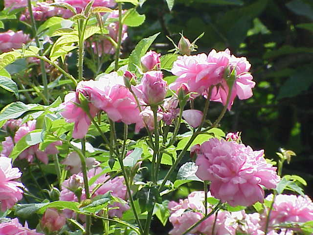 Species: Rosa damascena Family: Rosaceae Cultivar: Ispahan, vor 1832 Image No. 1